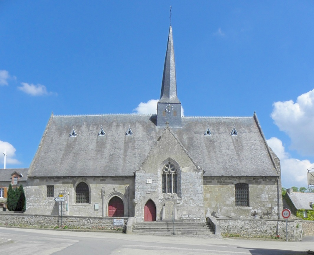 Église Saint-Gervais et Saint-Protais de Guenroc (22). Vue méridionale.